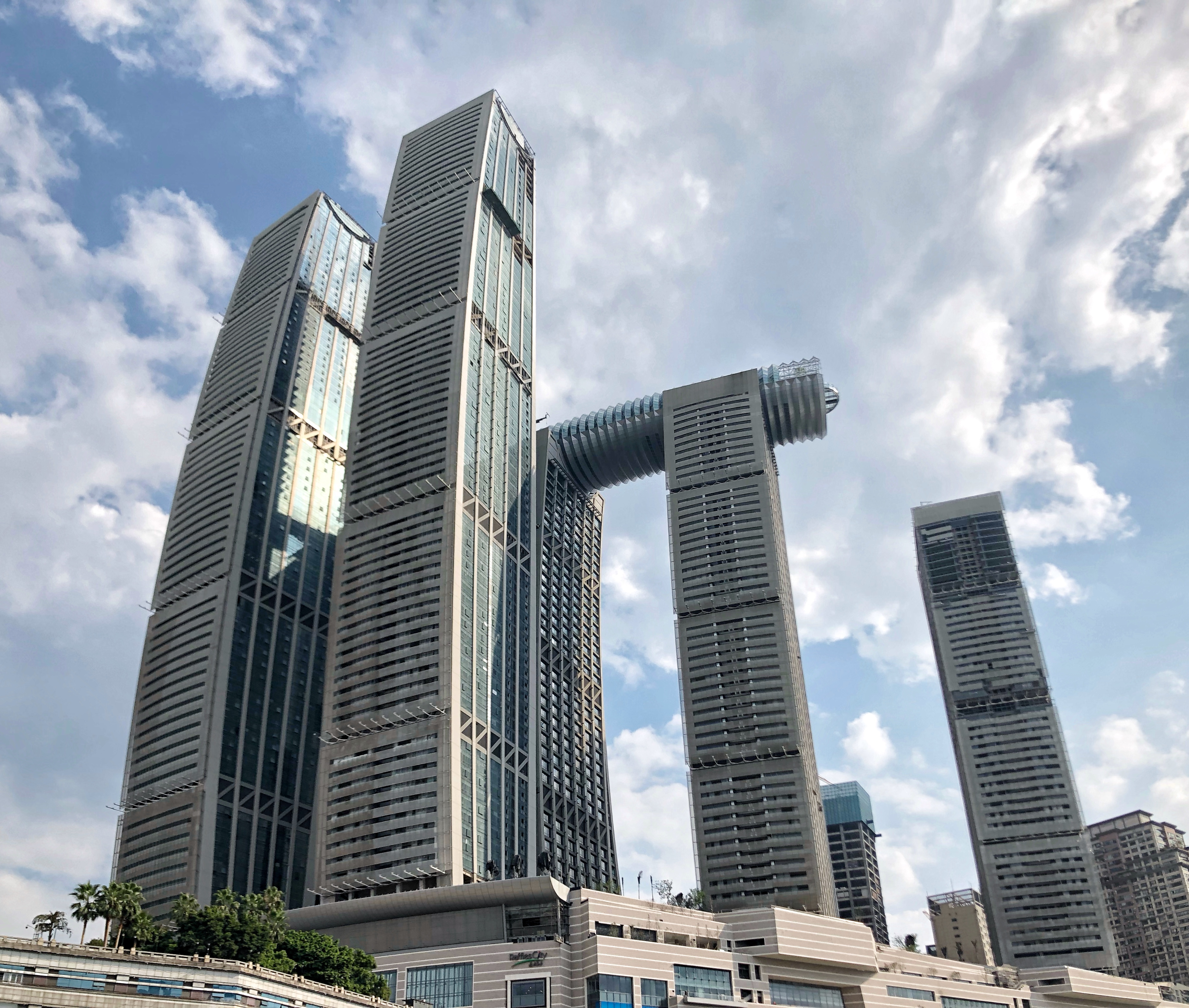 中文（中国大陆）: 重庆来福士广场 2019 年 9 月 3 日，来福士商场将于 9 月 6 日开幕营业